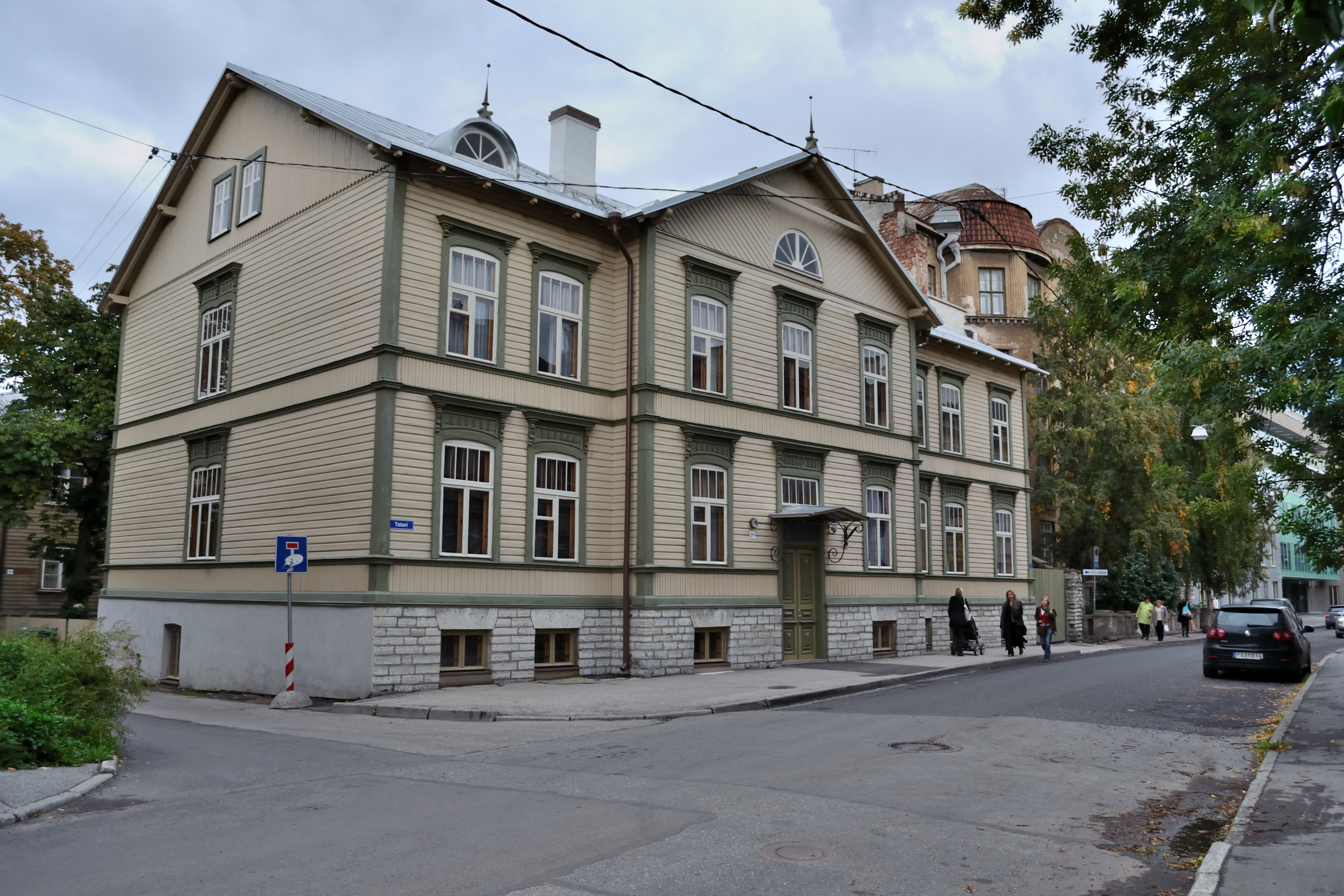 Tallinn, elamu Tatari 21A